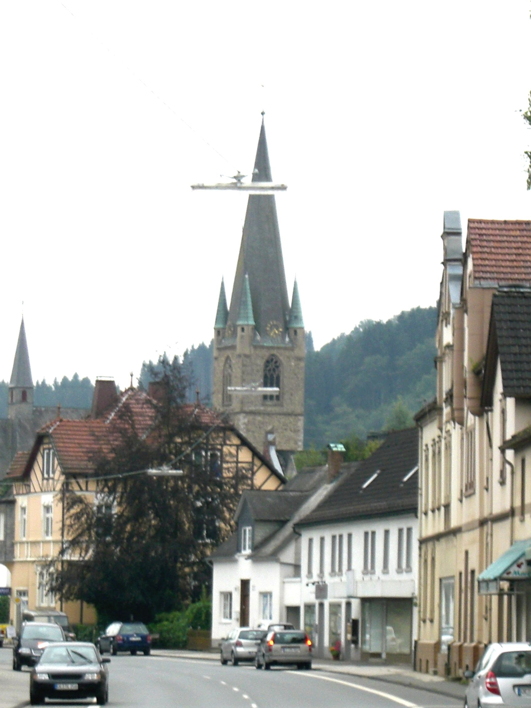 Hauptstraße Grevenbrück mit St. Nikolaus